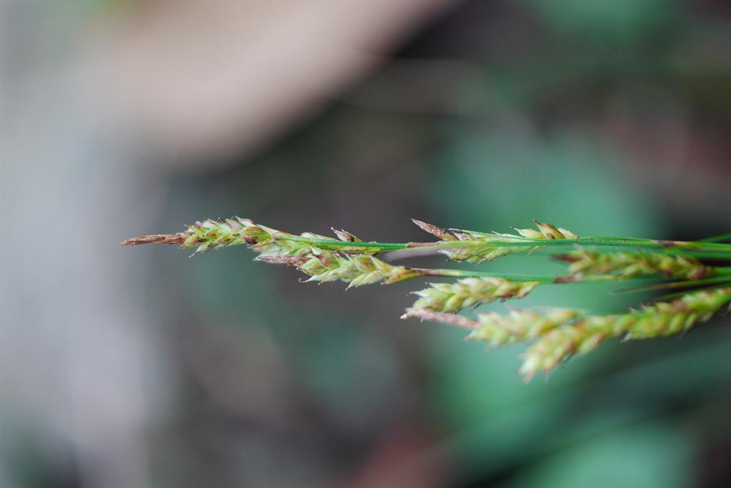 Carex_lenta_ナキリスゲ（カヤツリグサ科） 2012.10.14 和歌山県田辺市